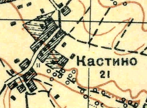 Топографическая карта Ленинградской области, квадрат О-35-24-Б-а (Переярово), деревня Кастино